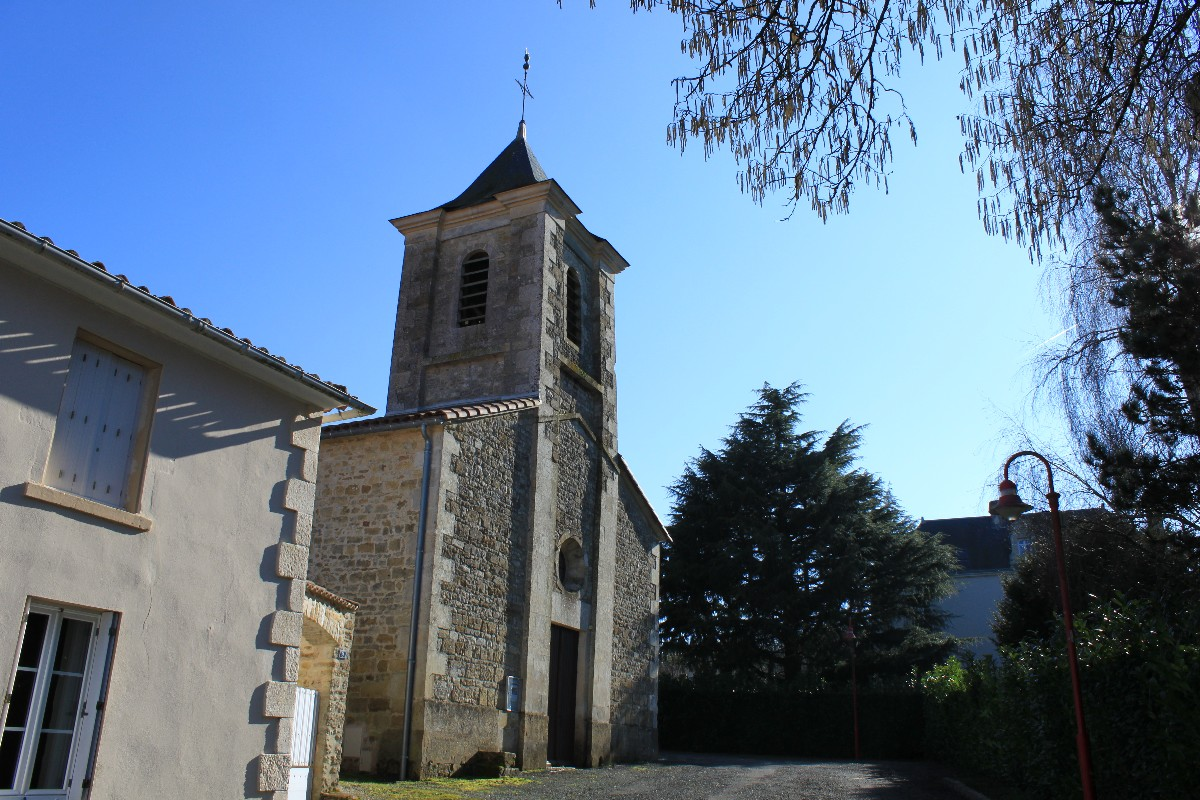 La Jaudonnière